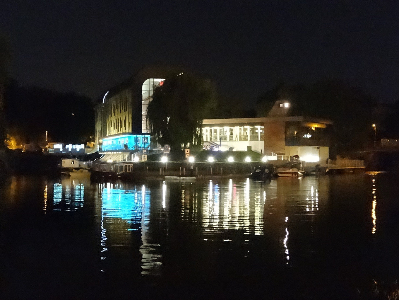 Przystań Bydgoszcz na Wyspie Młyńskiej